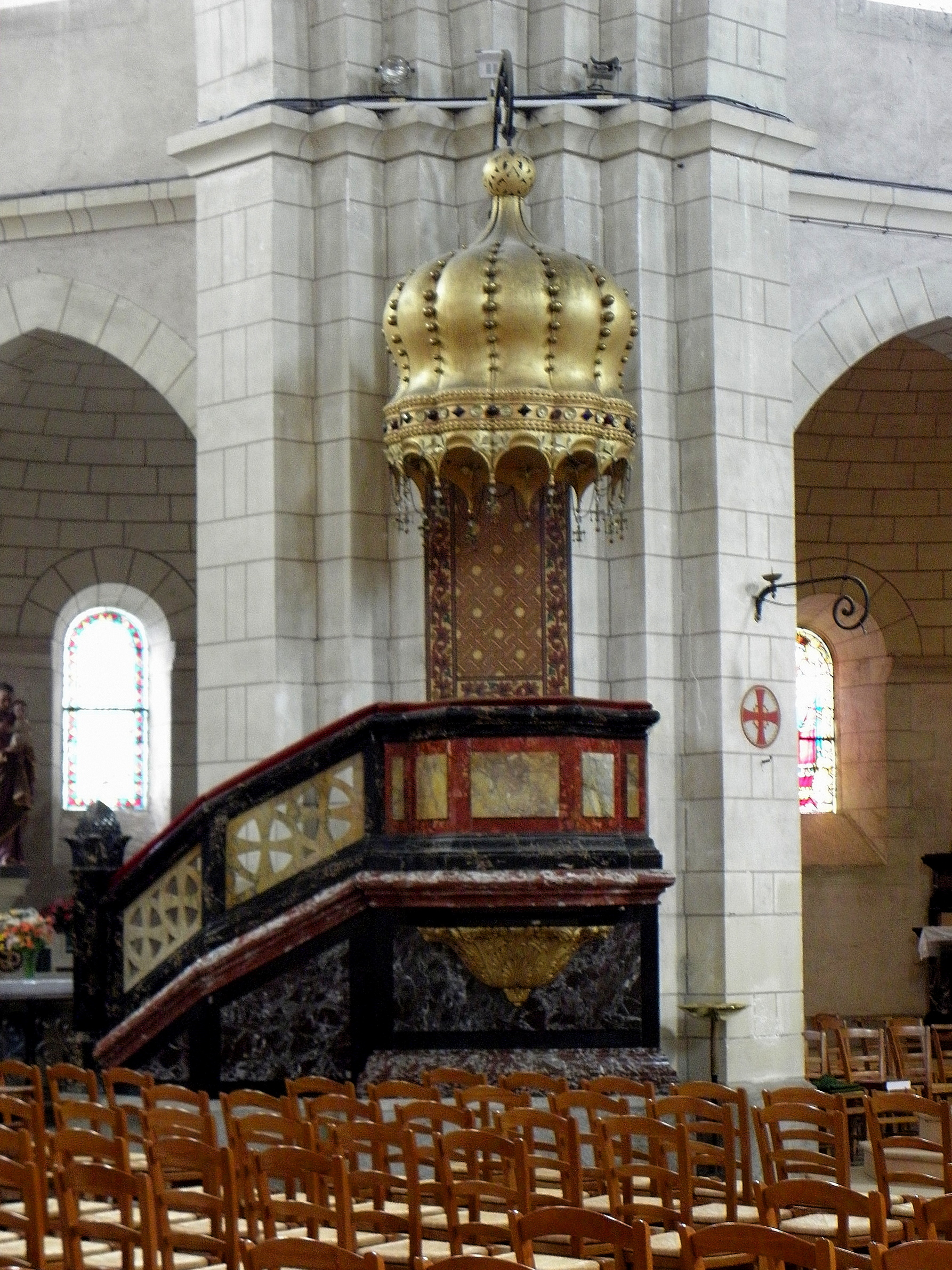 Intérieur de l'église Saint-Michel de Liffré (35). Chaire.